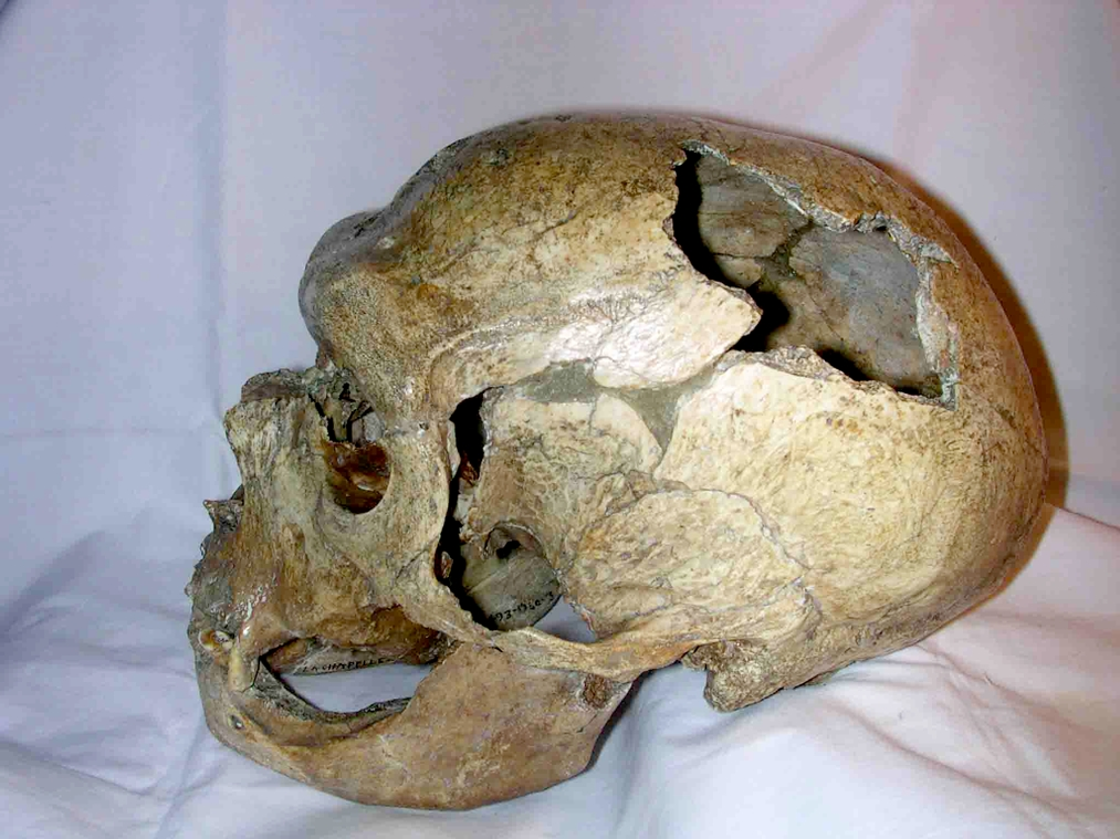 Neandertal skull from La Chapelle aux Saints.